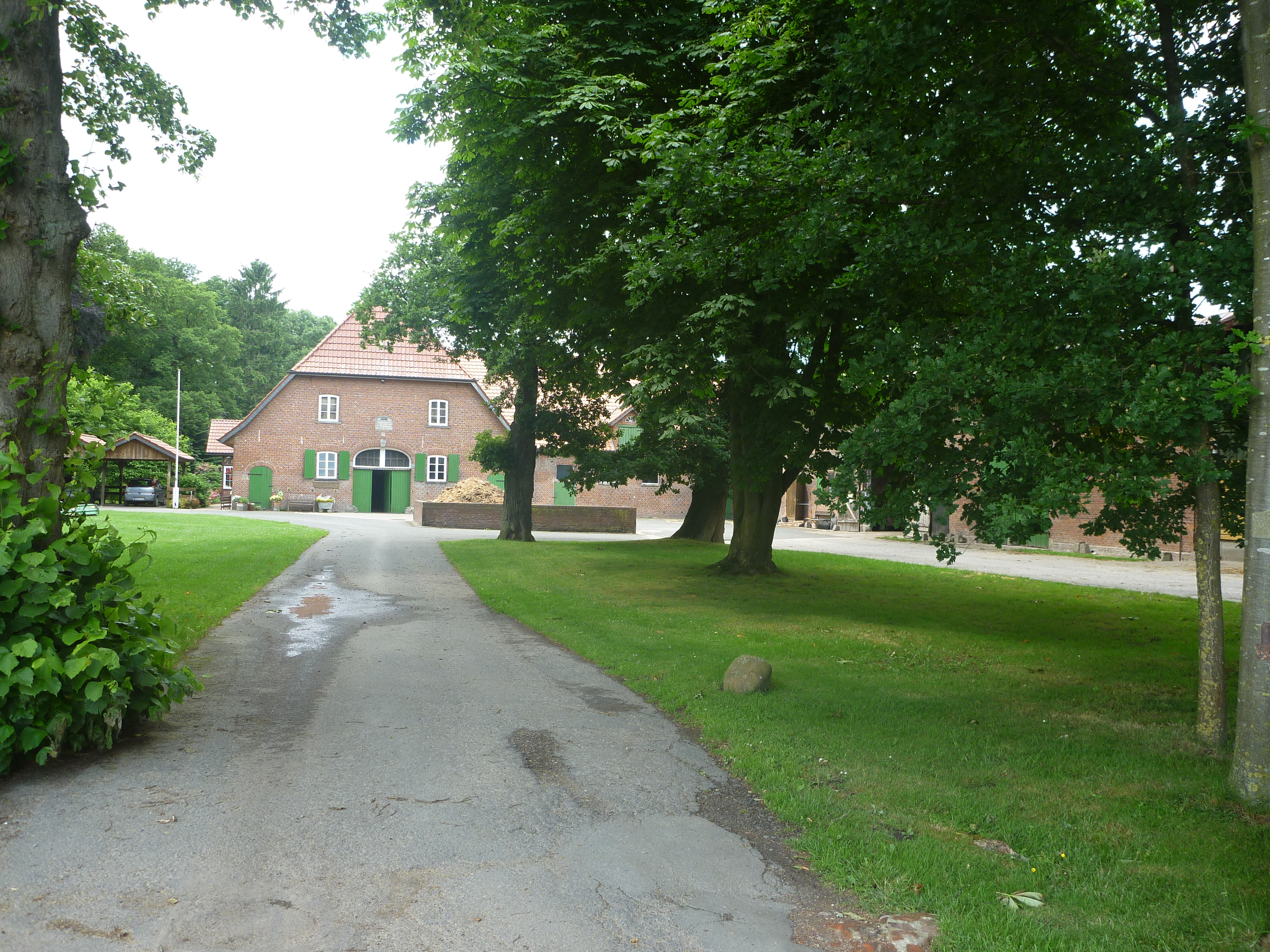 Osterhagen-Ihlpohl, Johann Heumanns Hof